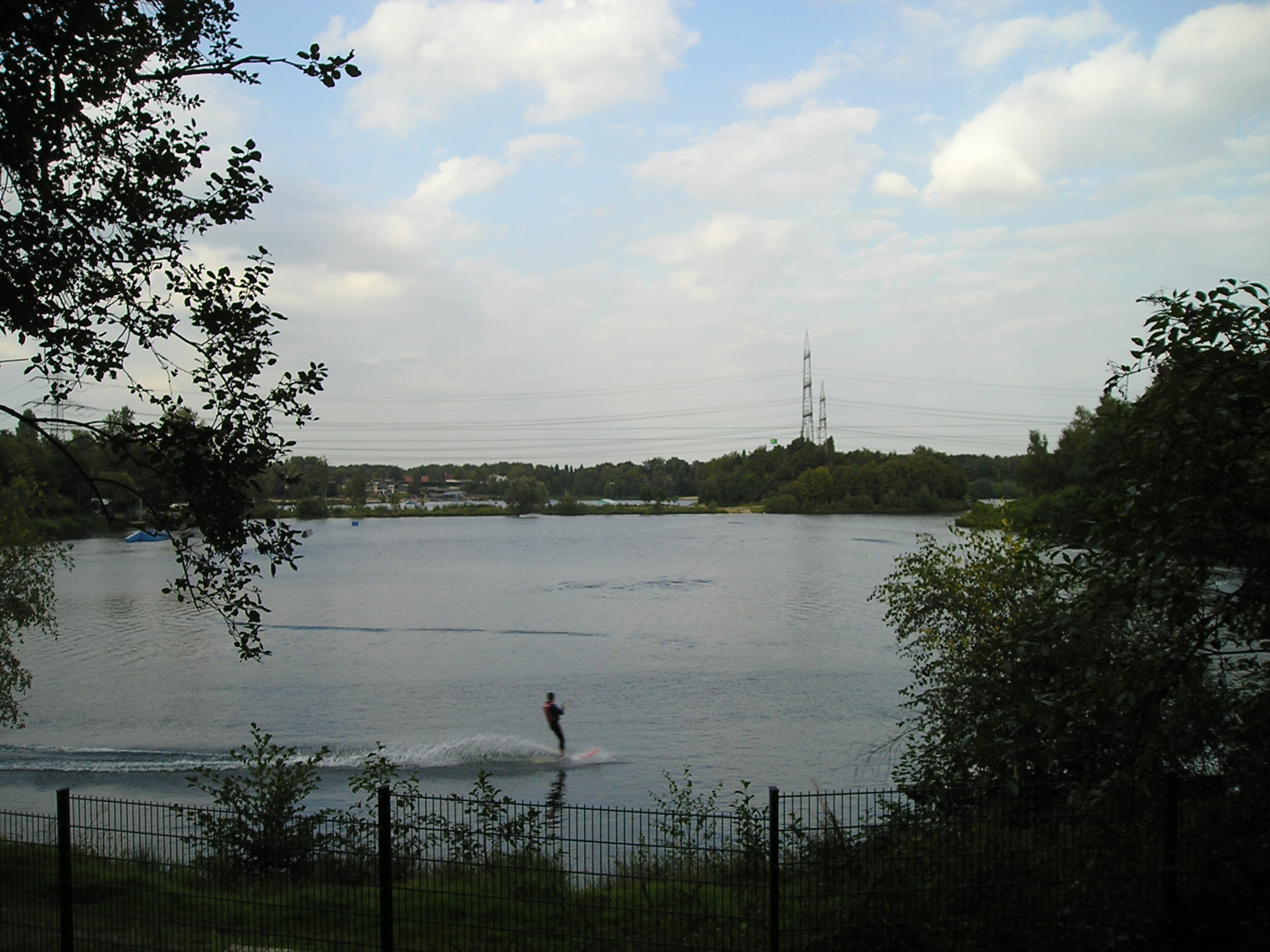 Wasserskianlage in Langenfeld-Berghausen